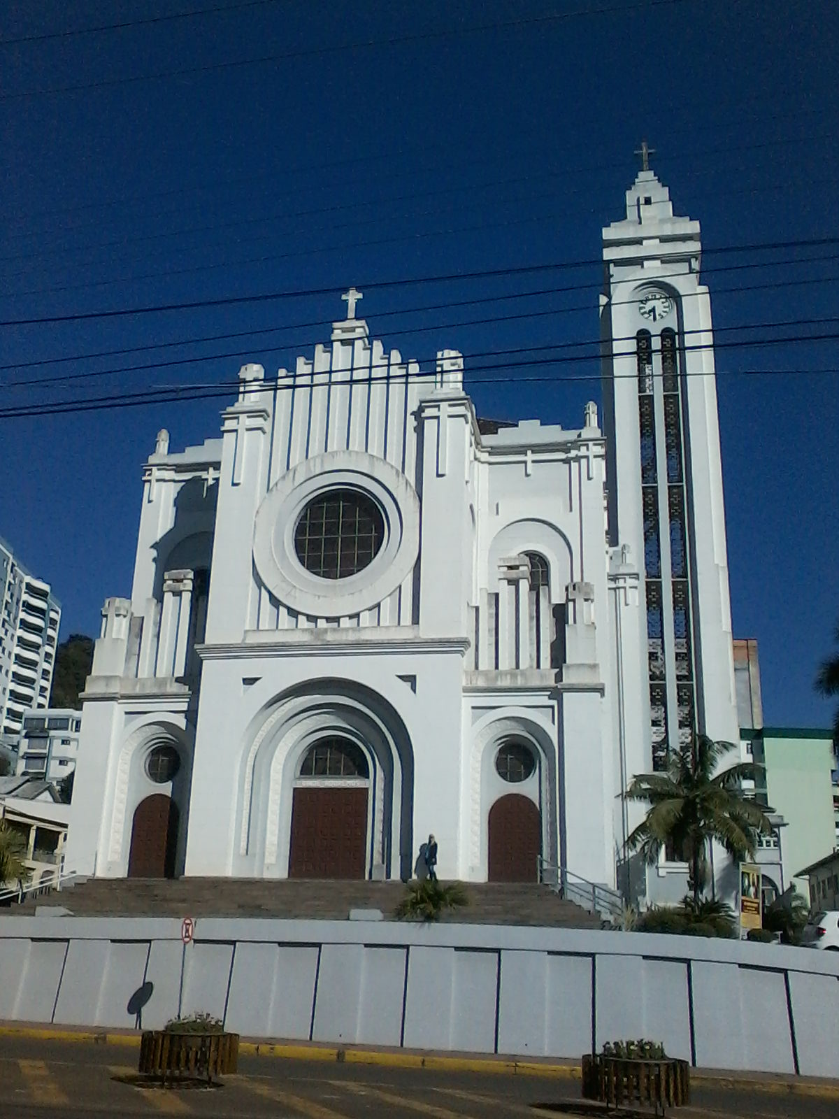 Português do Brasil: Catedral de Joaçaba, em 22 de junho de 2014